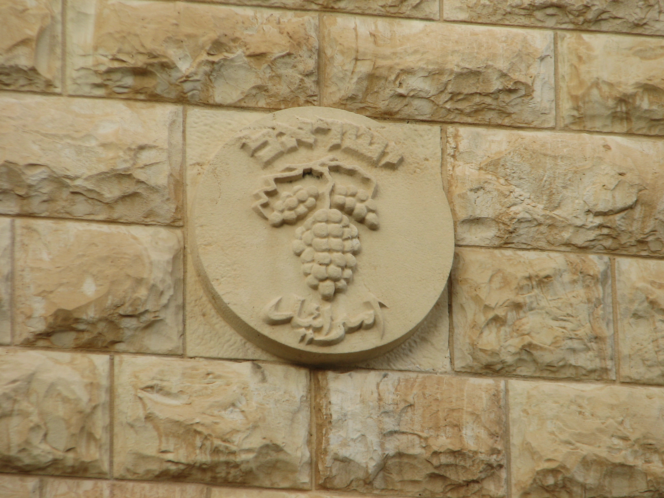 City Building, Haifa בני הסיטי בחיפה בעיר התחתית ברחוב נתנזון 1 לשעבר דרך יפו. נבנה ב-1925 כדי לשמש כסניף בחיפה של בנק אפ"ק. היום משמש כמבנה עסקים, שוכנת בו הקונסוליה של פורטוגל